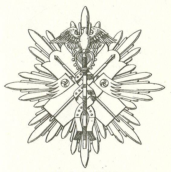 Eigen scan. Boek uit 1893.